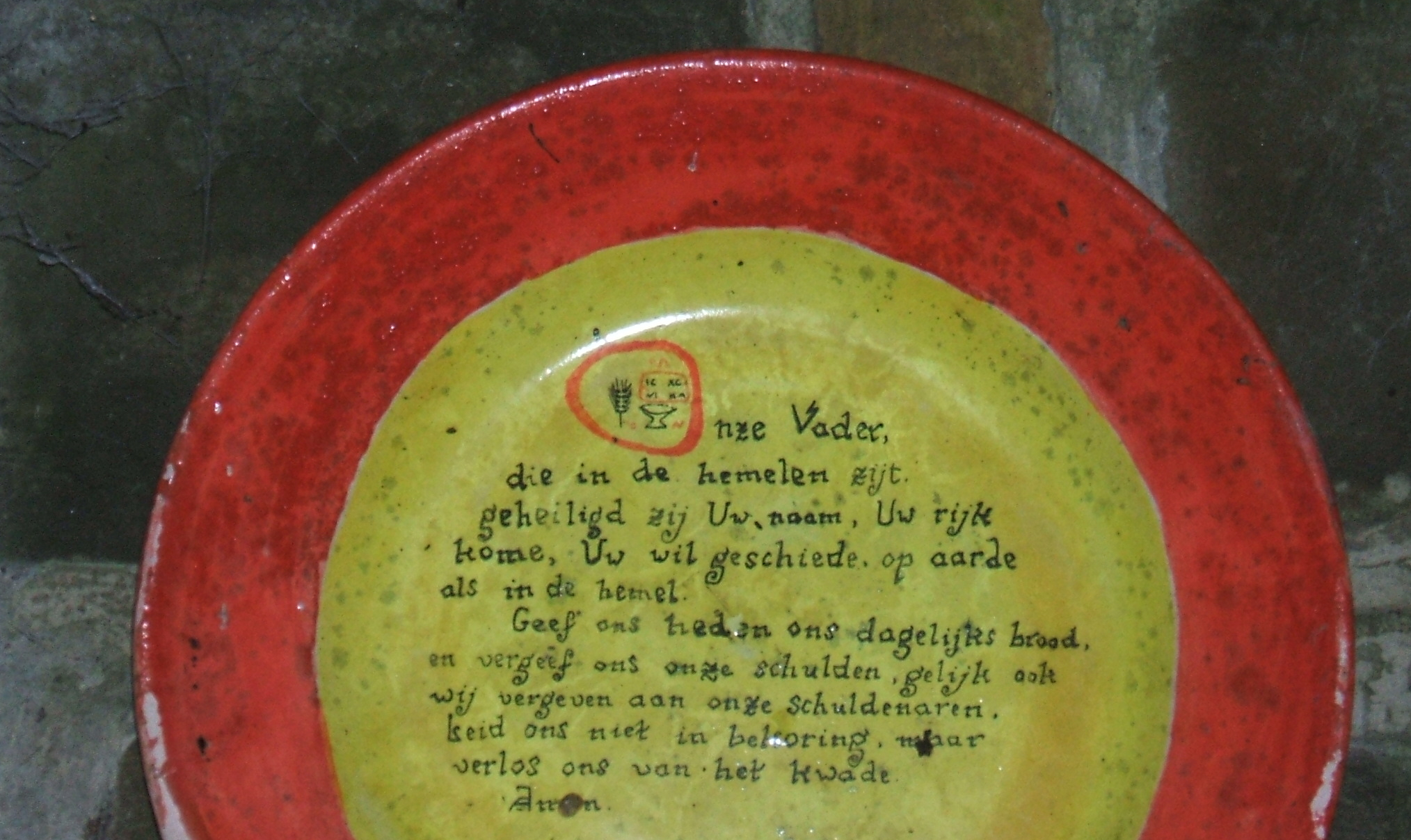 La prière dominicale en néerlandais normatif belge (flamand). Assiette peinte par moi-même, en avril 2003. Elle se trouve emmurée dans la porte d'entrée du jardin de l'Abbaye de Notre-Dame-du-Vivier, à Marche-les-Dames.